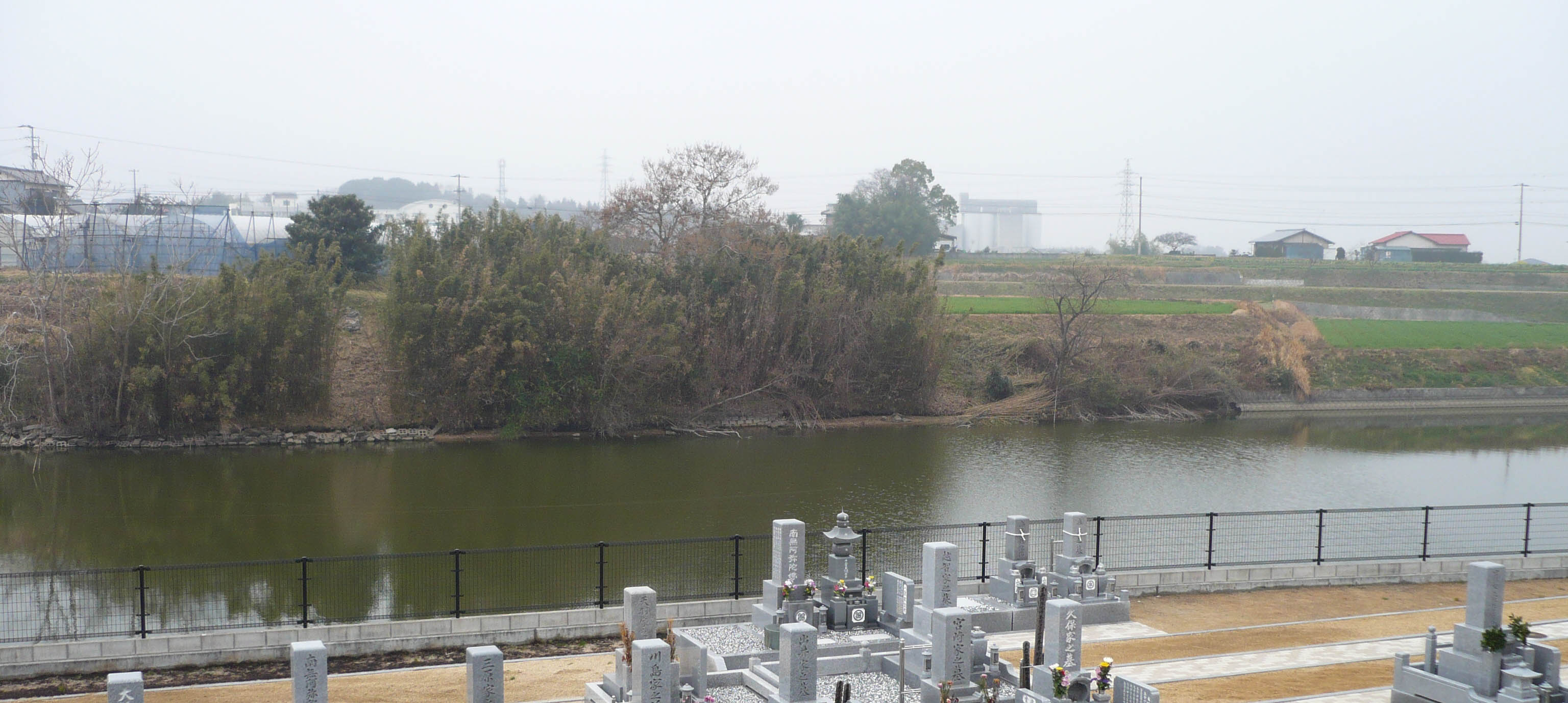 裏池